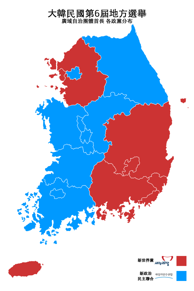 大韓民國第6屆地方選舉，廣域自治團體首長各政黨分布圖（繁體中文版）